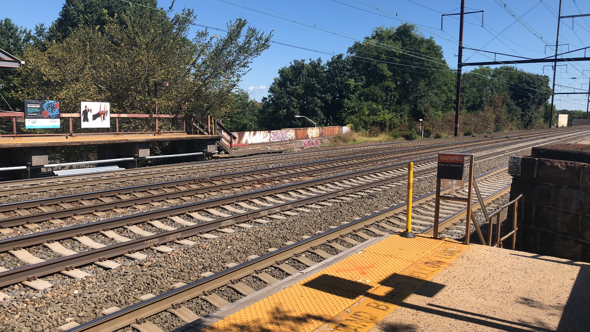 中文（中国大陆）: 新不伦瑞克站的轨道